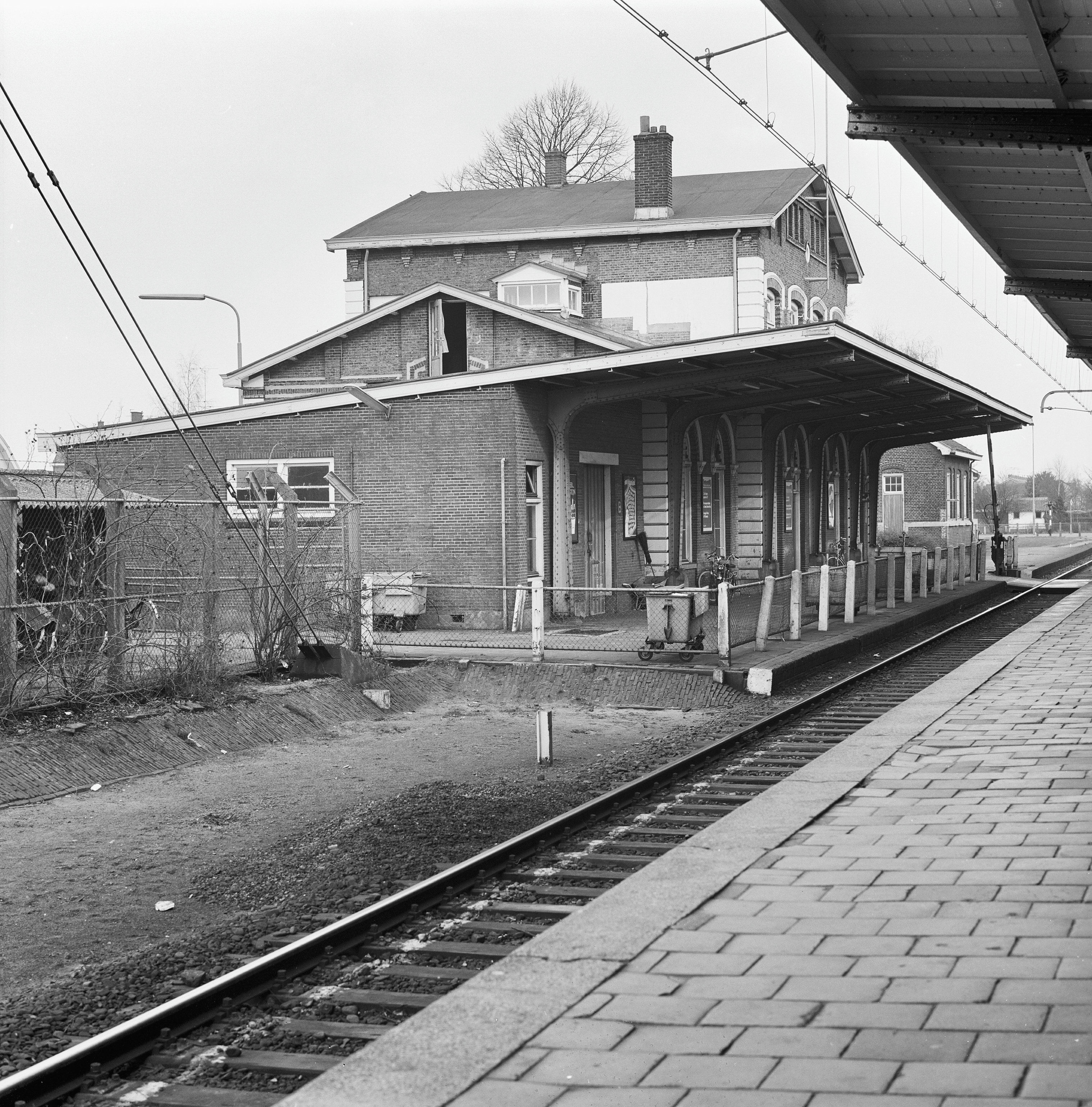 Station N.S.: achterzijde station